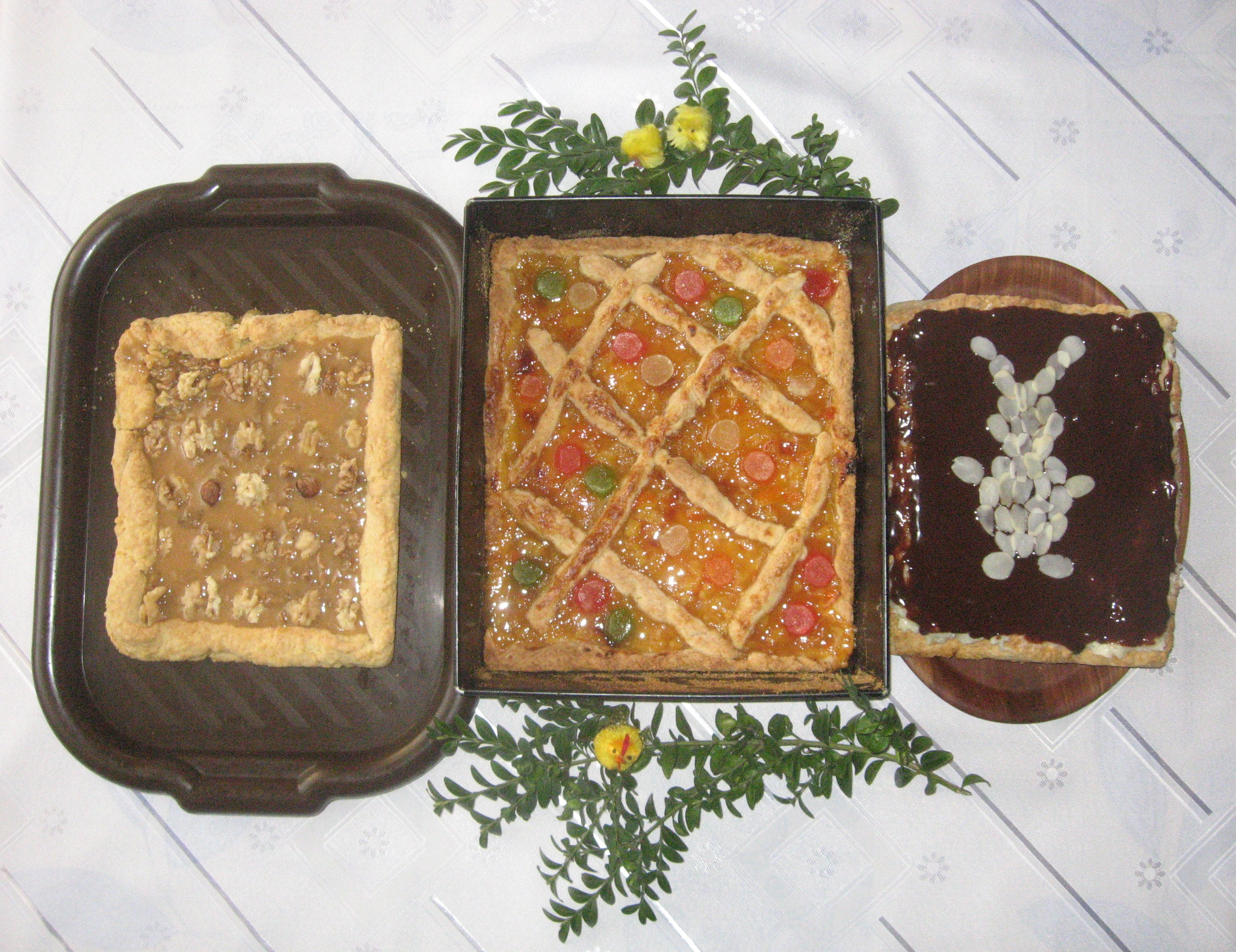 Mazurki wielkanocne